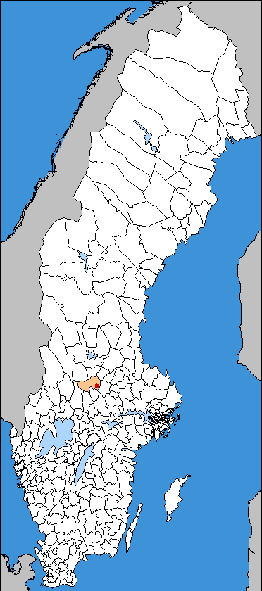 Ludvika Municipality and Ludvika, in Dalarna in Sweden